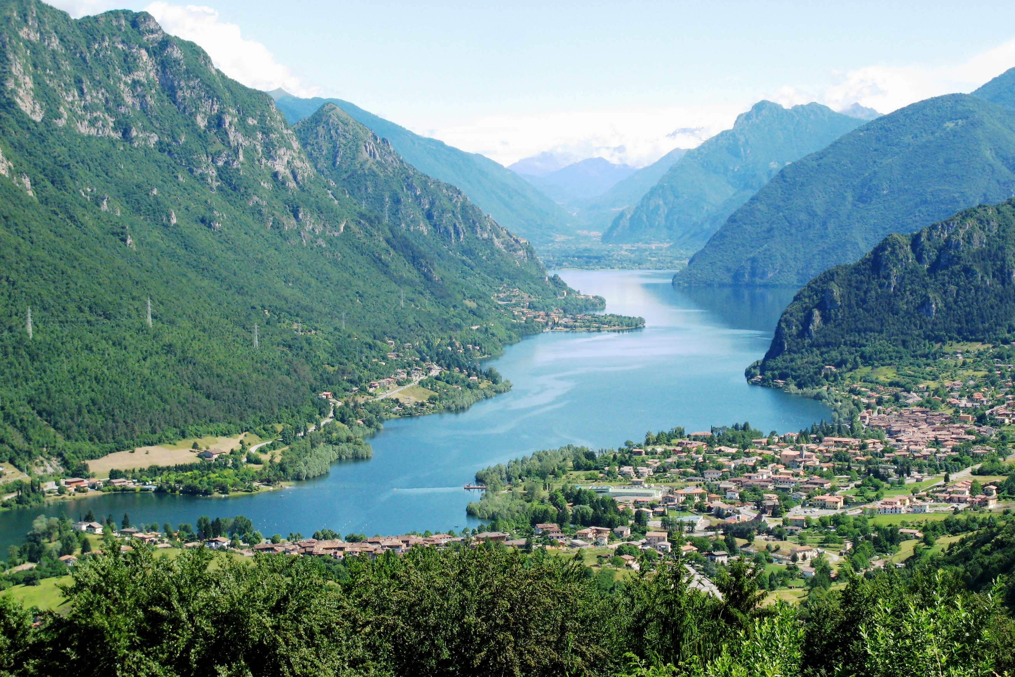 Den Idroséi vun der Via Treviso aus gesinn.